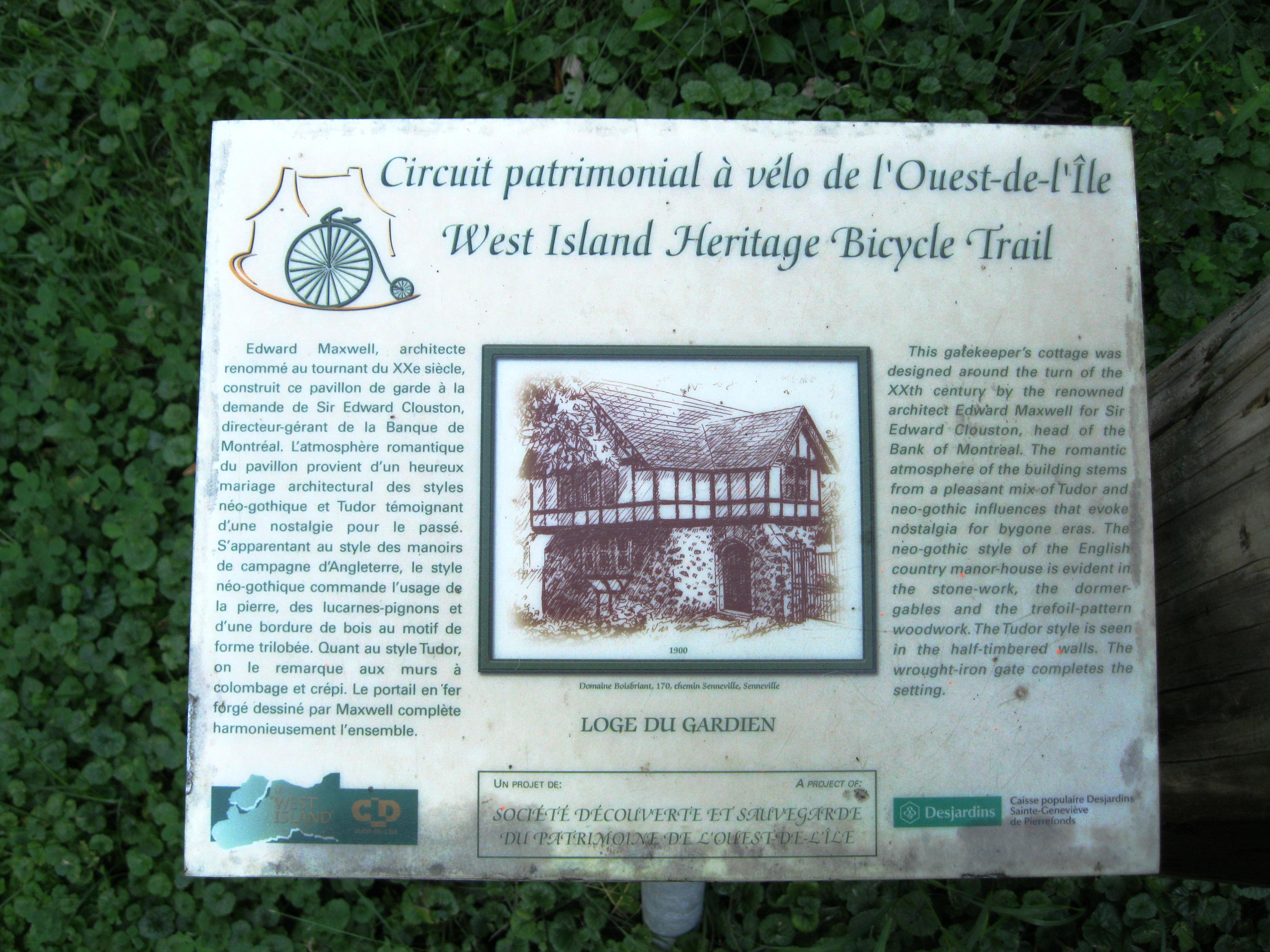 La loge du gardien, 170, chemin de Senneville, Senneville. « C’est entre 1898 et 1911 que le banquier Edward Clouston fait construire cette maison, dont les plans sont attribués aux architectes Georges C. Shattuck et Edward Maxwell. Le bâtiment, érigé à l’entrée d’un vaste domaine, est alors destiné à servir de loge au gardien. Il est notamment caractérisé à l’étage par des colombages décoratifs. » Grand répertoire du patrimoine bâti de Montréal